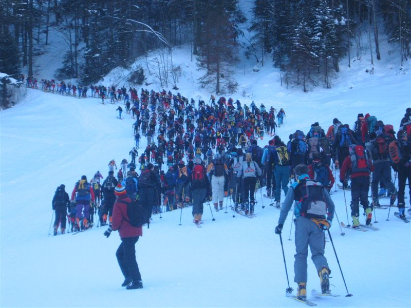 Départ du Trophée des Gastlosen 2006, grand parcours. Photo : Karin Biland, droits cédés au comité d'organisation de la manifestation.